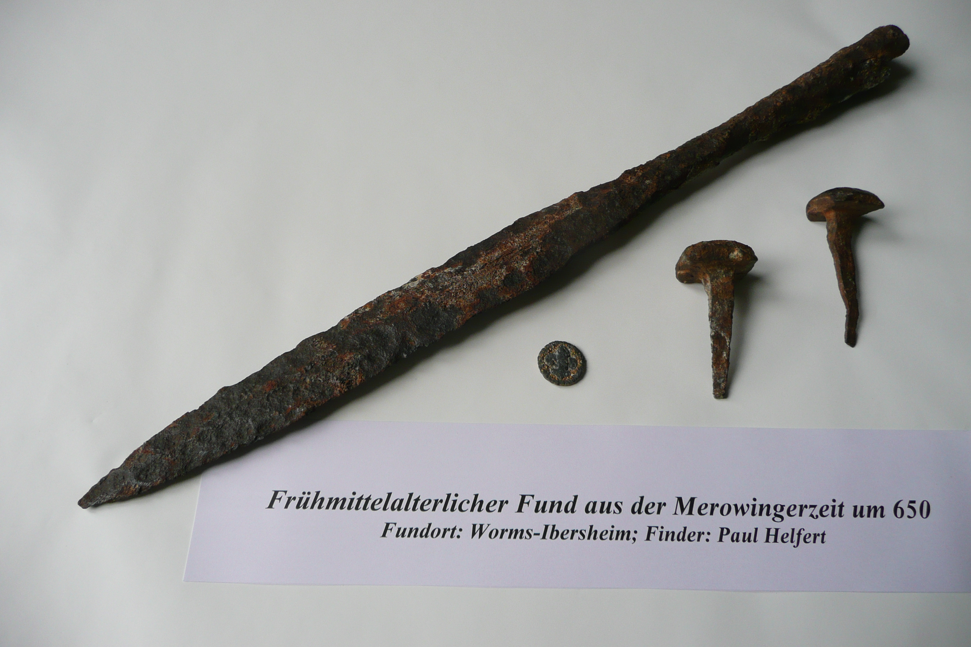 Worms-Ibersheim, Lanzenspitze aus der Merowingerzeit um 650